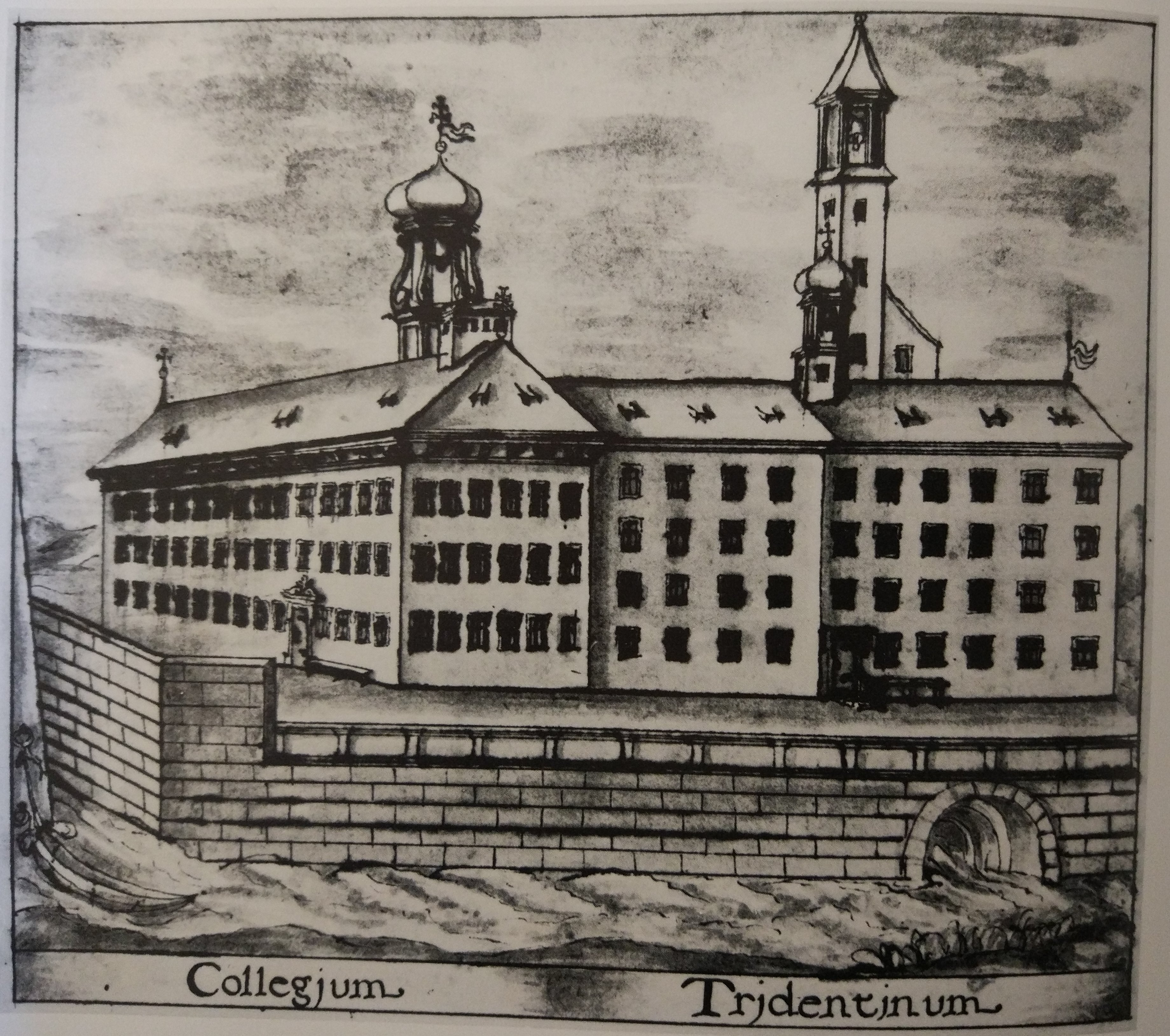 Disegno a penna e acquerello